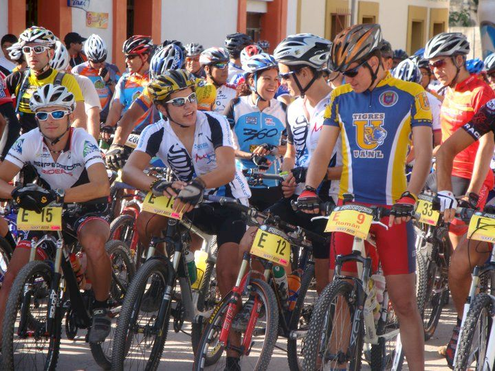 Maratón Anual de Ciclismo de Montaña “Iturbitón” (en Otoño)